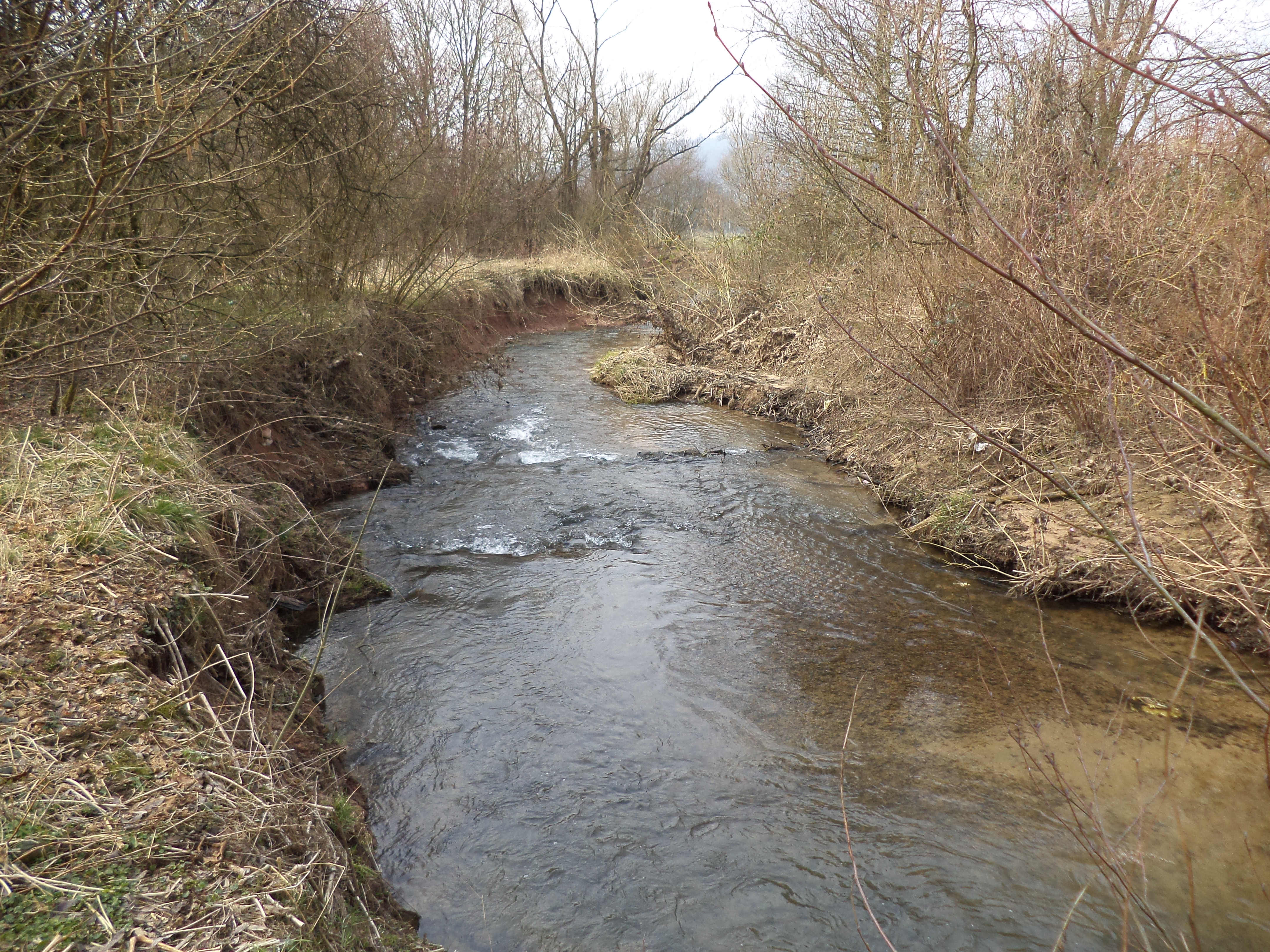 Die Orb kurz vor ihrer Mündung